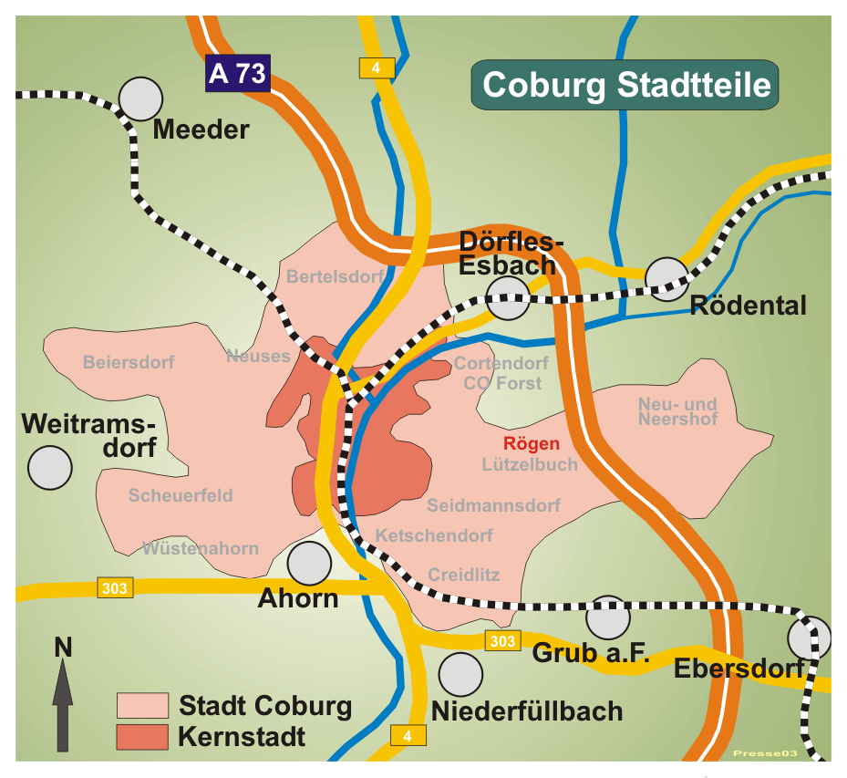 Karte von Coburg, Stadtteil Rögen